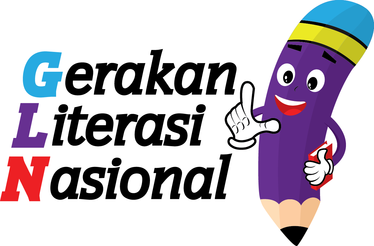 Logo Gerakan Literasi Nasional. Gerakan ini digagas oleh Kementerian Pendidikan dan Kebudayaan Republik Indonesia.